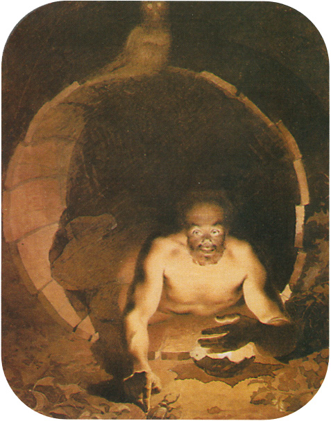 Диоген